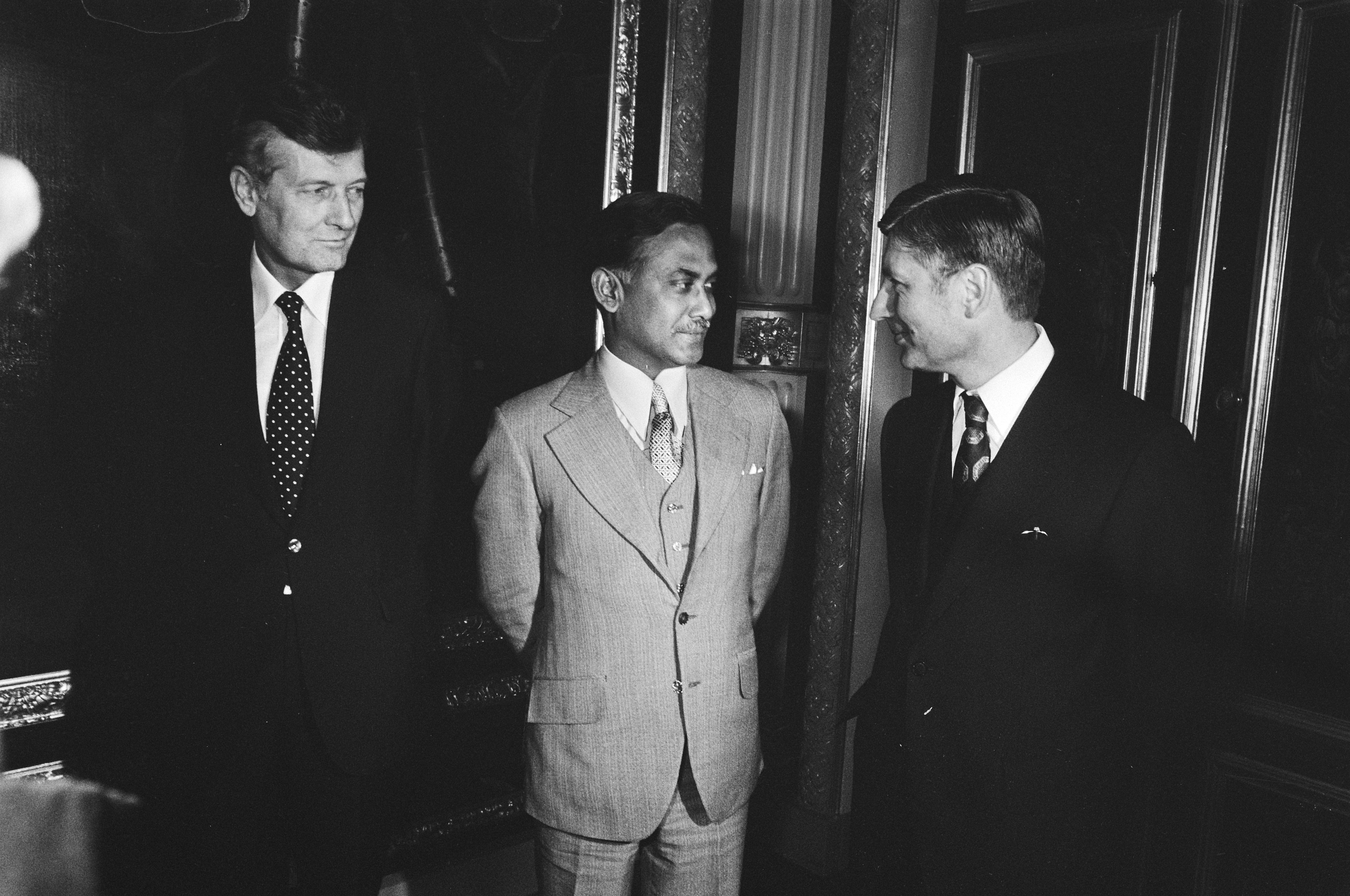 Ontvangst door premier van Agt; v.l.n.r. minister de Koning , president Ziaur Rahman en premier van Agt